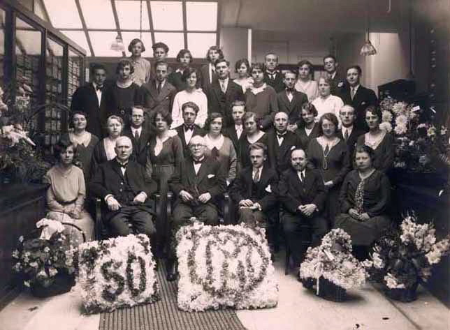 Groepsportret ter gelegenheid van het 50-jarig bestaan van Maussen in Wyck-Maastricht met het personeel en de directie bestaande uit Louis, Jos en Alfred Maussen en bedrijfsleider Braun. Fotocollectie RHCL, GAM 1635.